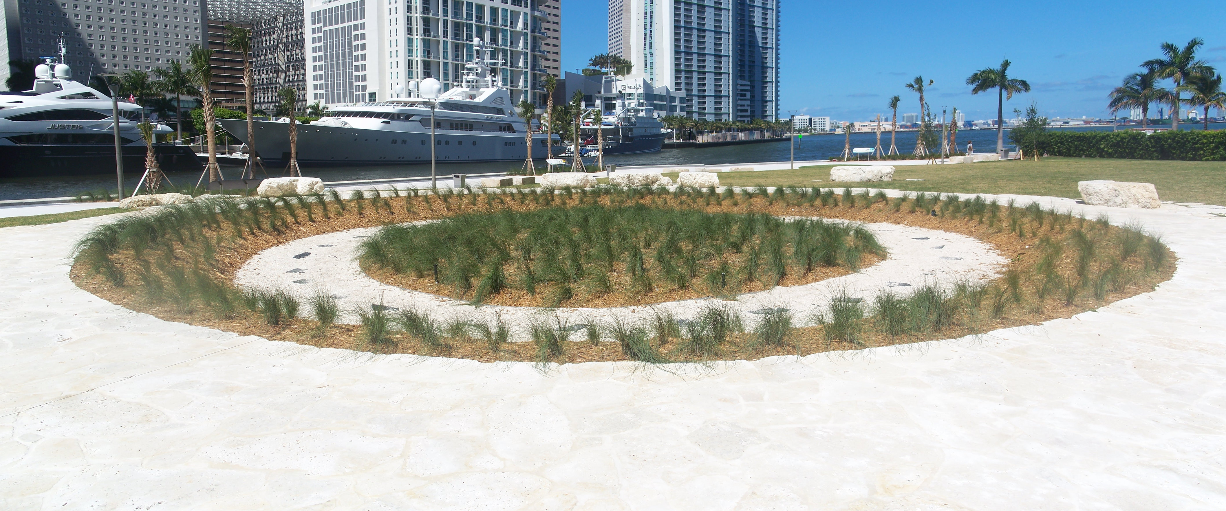 Miami, Florida: Miami Circle